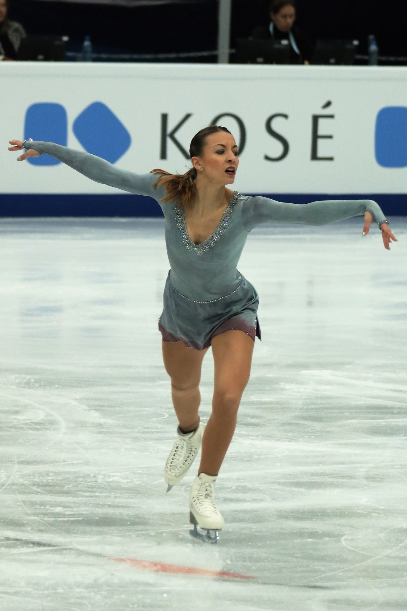 Николь Шотт (Германия) на Чемпионате Европы по фигурному катанию 2018.